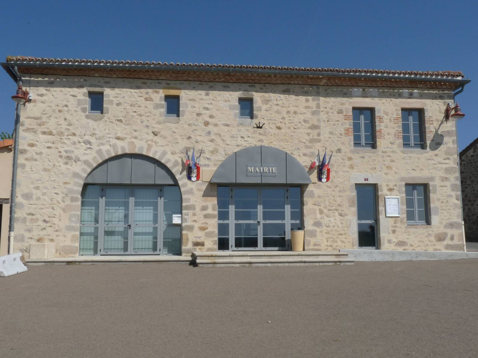 Mairie de Brillac, Charente, France